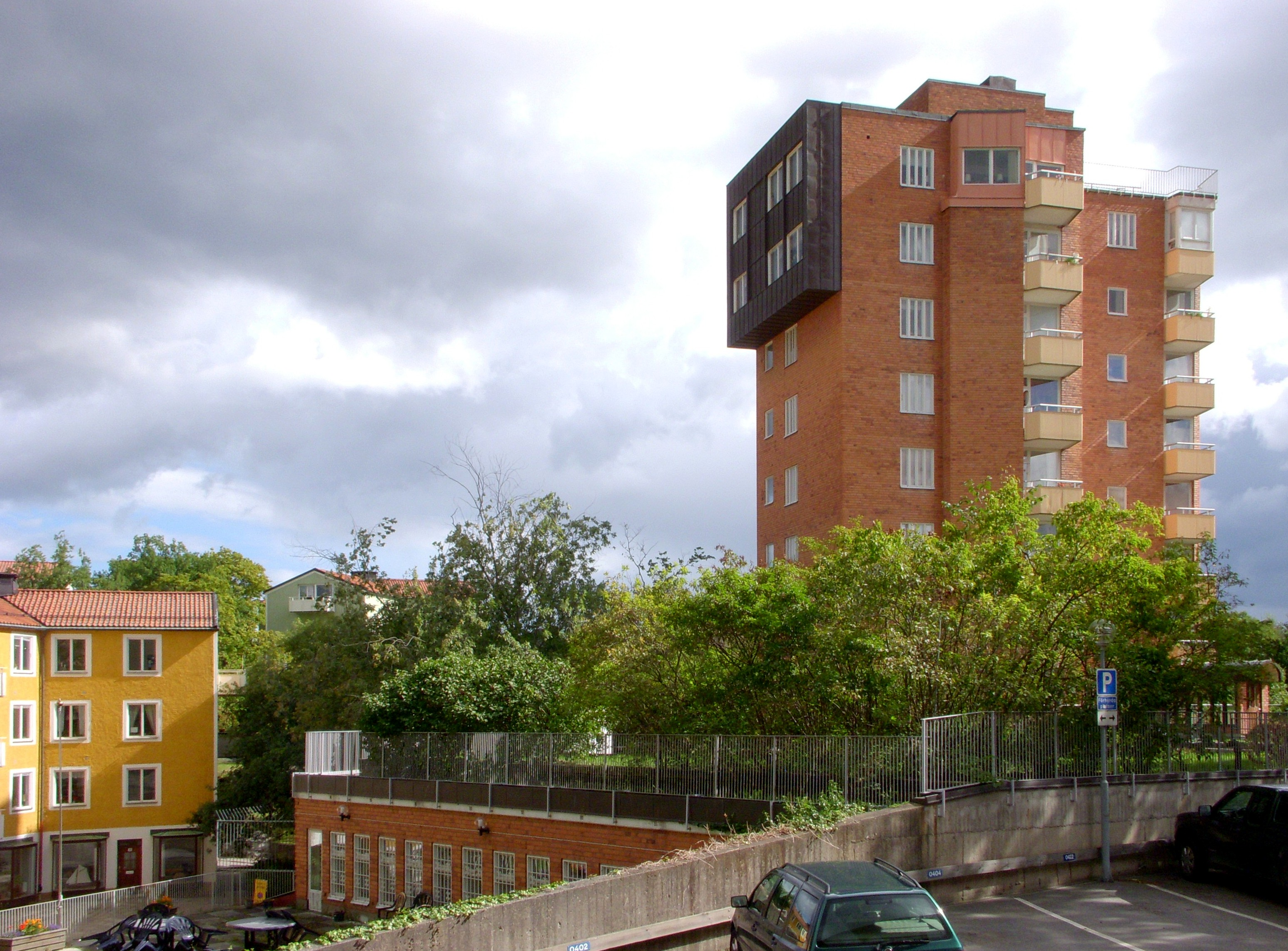 Det så kallade "Galjonshuset" i Gröndal med Stjärnhusen till vänster